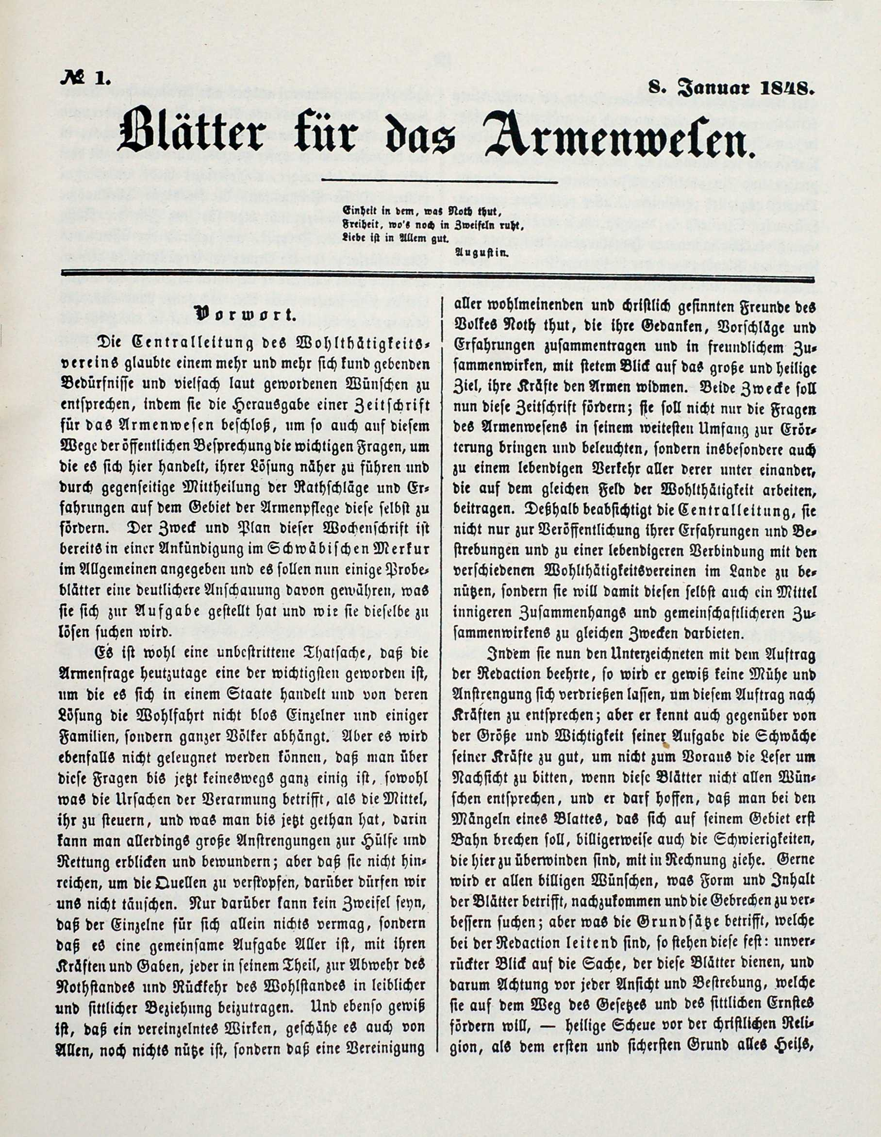 Das Bild zeigt die Erstausgabe der Blätter für das Armenwesen, dem Vorläufer der Blätter der Wohlfahrtspflege